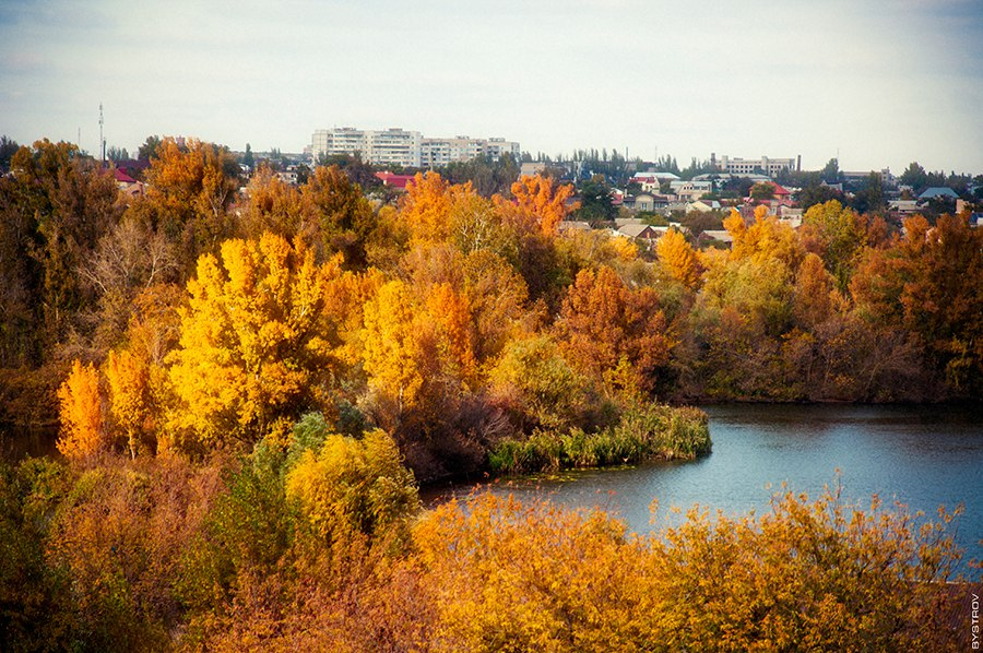 Вид на р. Кошевая и р-н Забалку со стороны острова